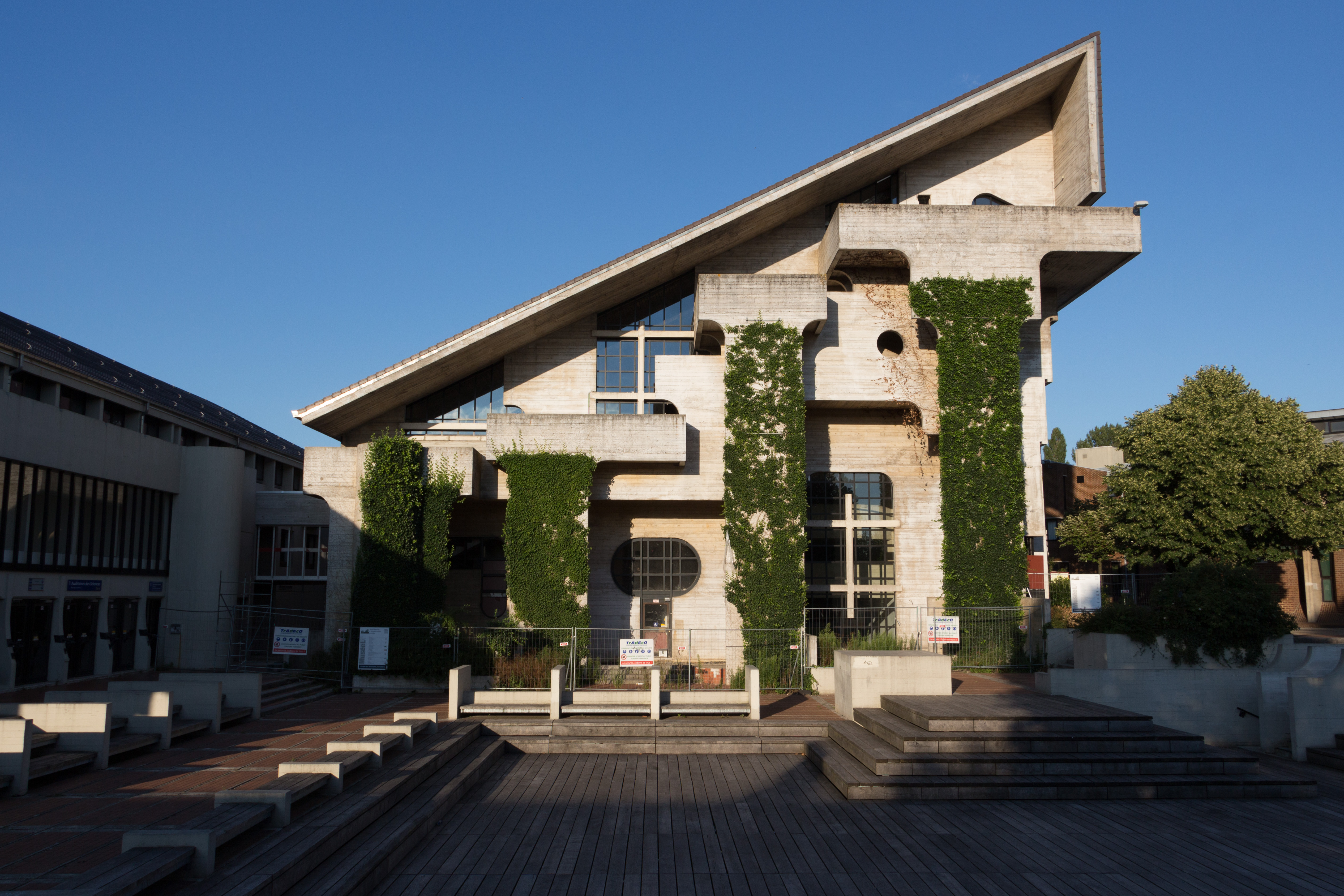 Vue de l'ancienne bibliothèque des Sciences de l'UCL à Louvain-la-Neuve, en cours de transformation en musée universitaire.